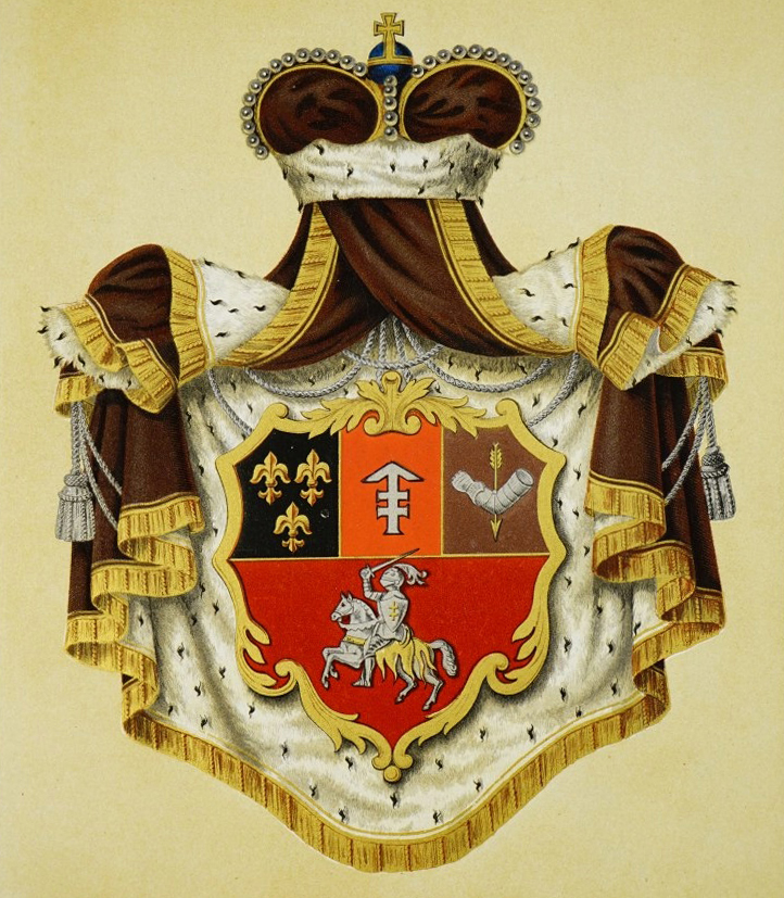 Беларуская (тарашкевіца): Вялікі герб князёў Сапегаў (Sapieha) з Пагоняй (Pahonia)